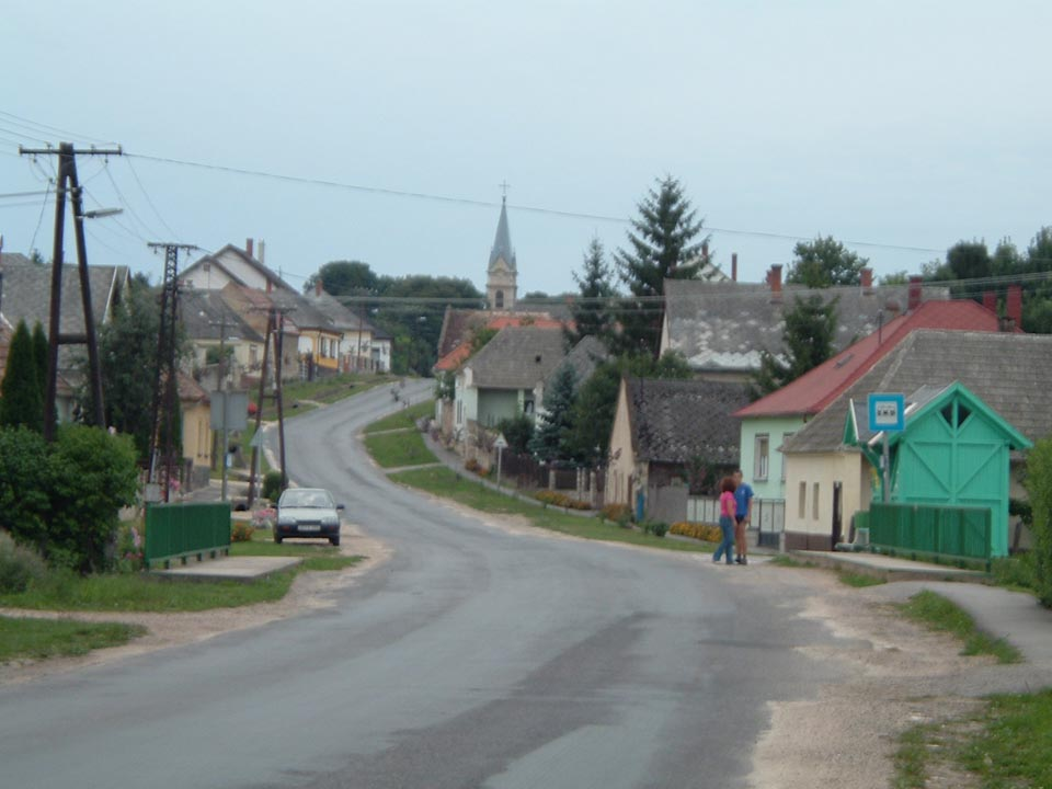 Bakonyoszlop, Hungary